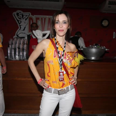 Atriz Deborah Evelyn acompanhou o 1º dia de desfiles do Carnaval do Rio de Janeiro no camarote.